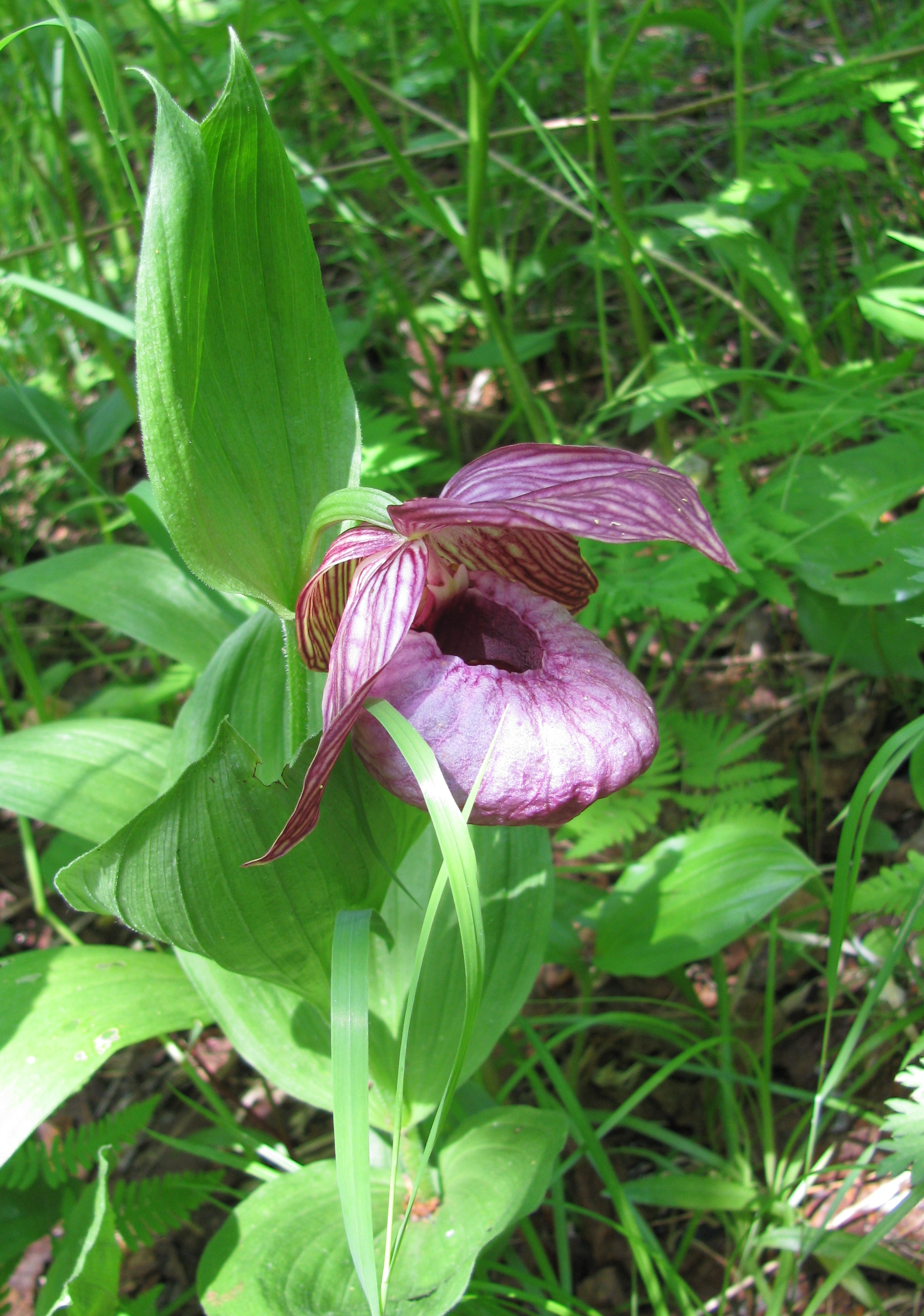 цветок Башмачка крупноцветкового фото сделано на Камчатке, в 2009 году.